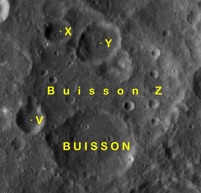 Cráter lunar Buisson. Cráteres satélite. (Imagen LRO)